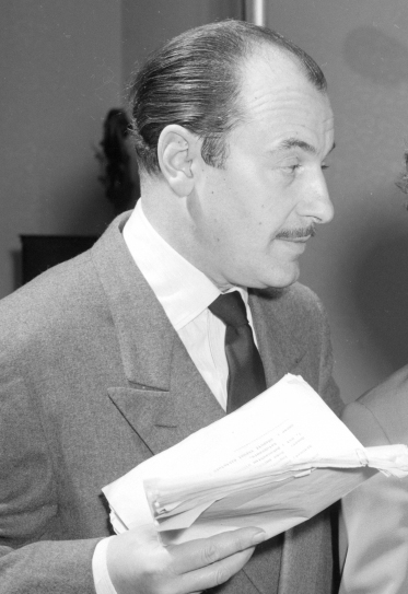 Guido Wieland bei einer Aufnahme im Wiener Studio des Senders Rot-Weiß-Rot